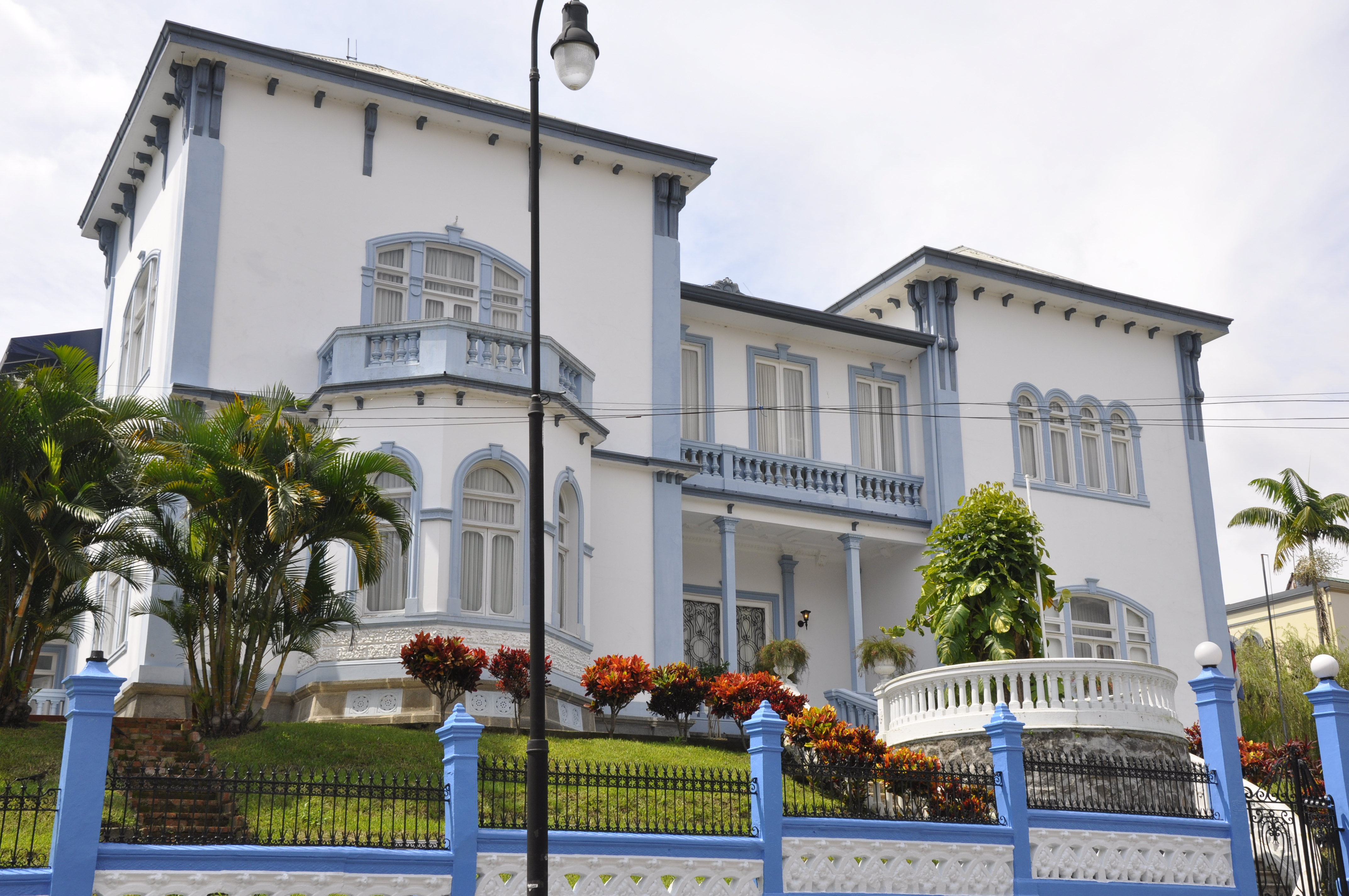 El Castillo Azul, edificio anexo de la Asamblea Legislativa, Cuesta de Moras, San José, Costa Rica